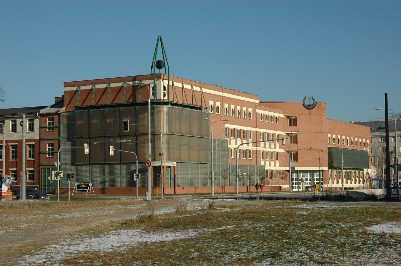 Janáčkova konzervatoř a Gymnázium v Ostravě, Českobratrská ulice, Ostrava